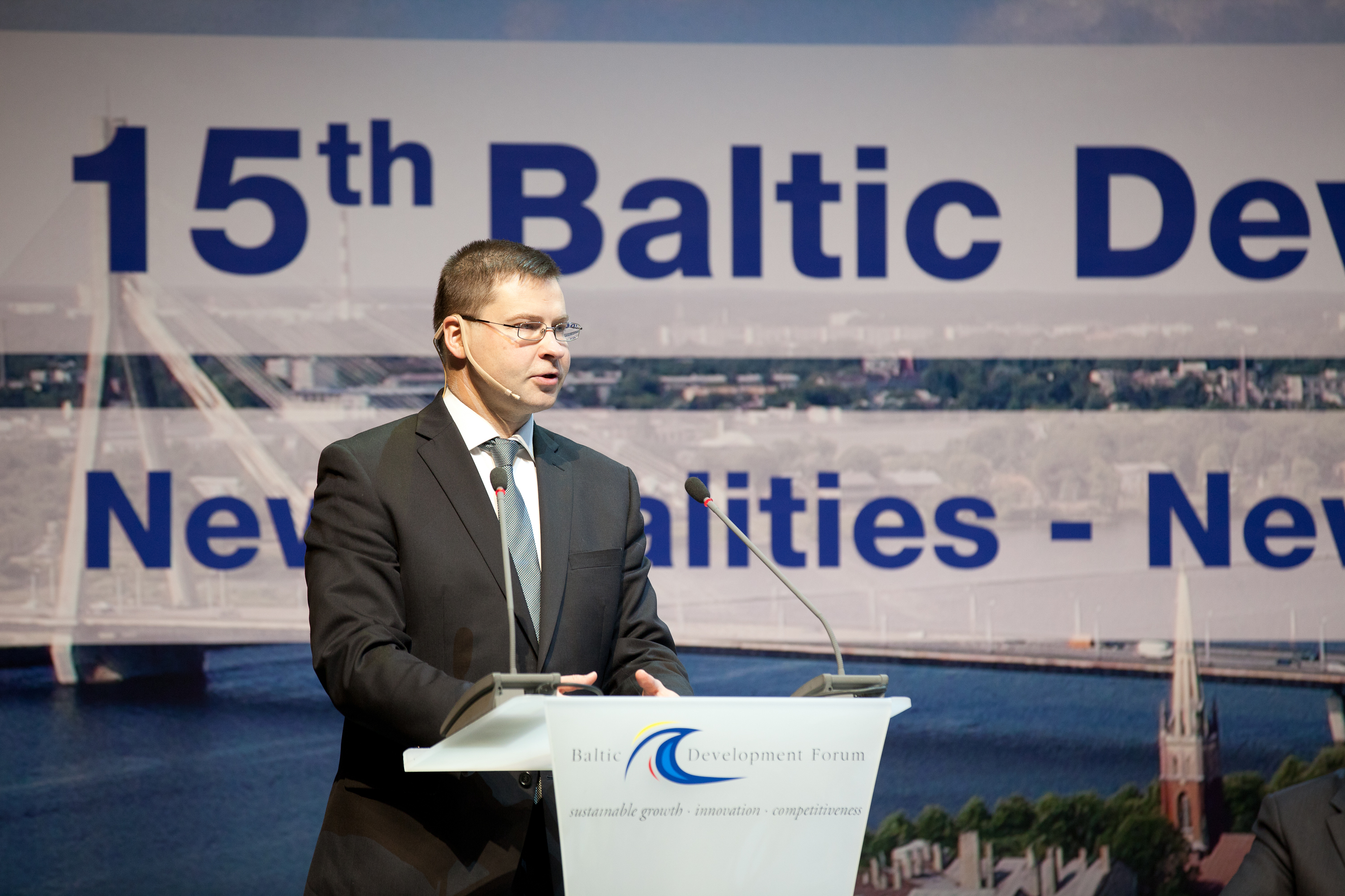 Foto: Toms Norde, Valsts kanceleja